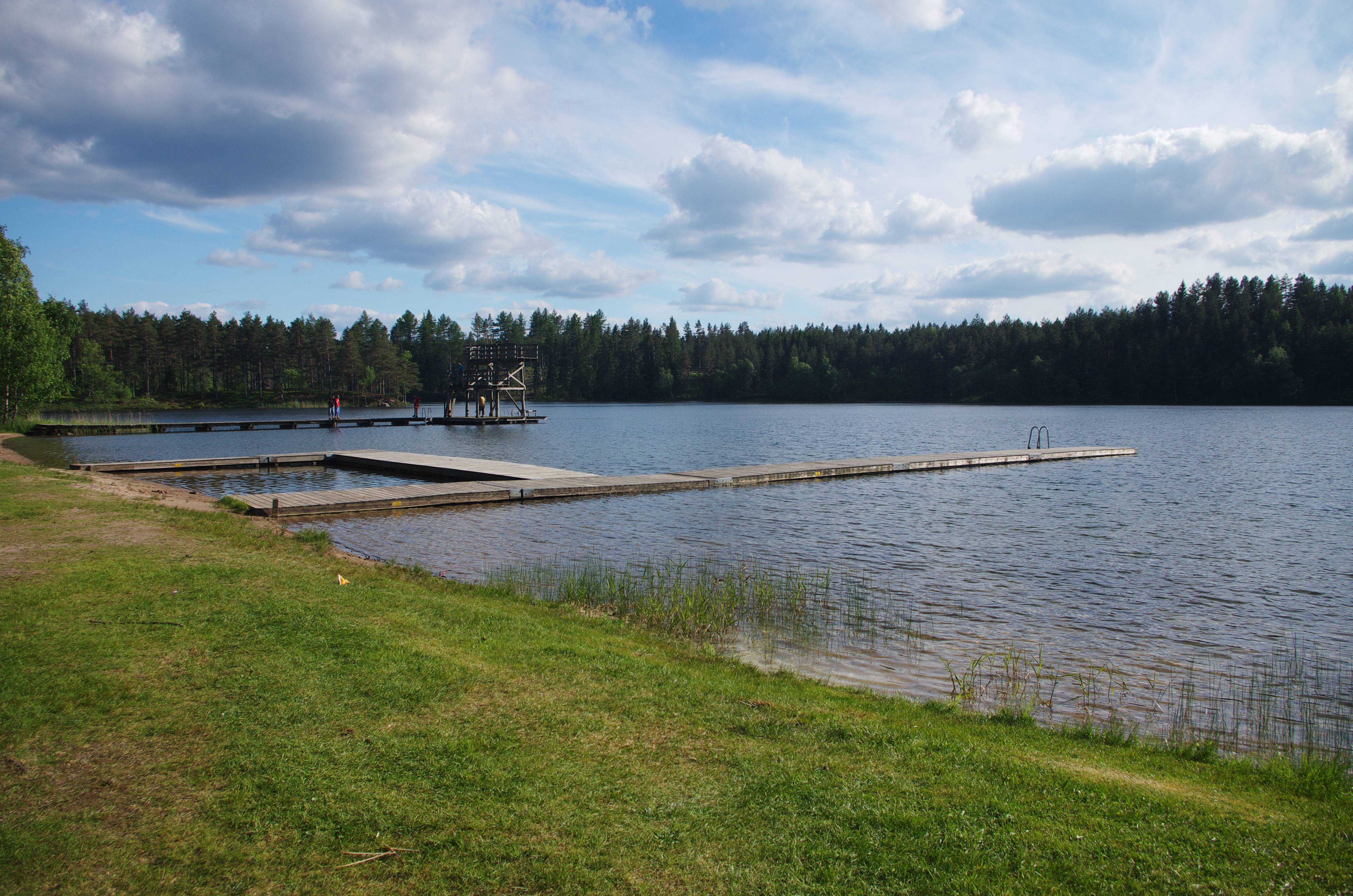 Lilla Havsjön eller Lilla Havssjön är en badsjö på Hökensås i Tidaholms kommun i Västergötland, Sverige.